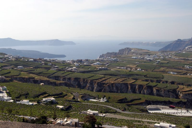 Santorini - Vineyards